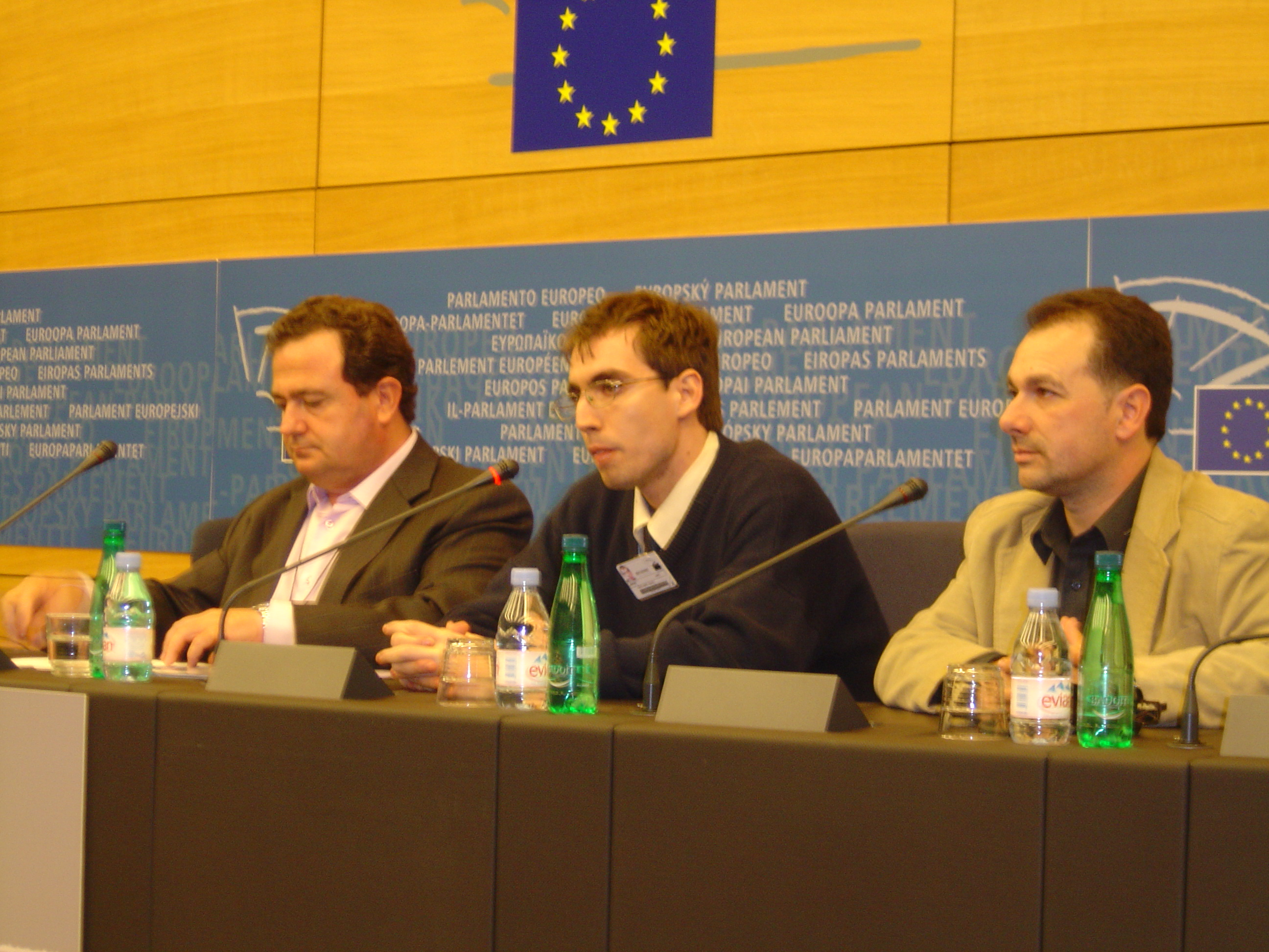 Defensa del català a la Franja de Ponent al Parlament europeu. Novembre de 2005. D'esquerra a dreta l'europarlamentari Bernat Joan, l'advocat de la Institució Cultural de la Franja de Ponent Jordi Juan i Guillem Chacon, secretari general de la ICFP i impulsor de la iniciativa internacional en favor del català